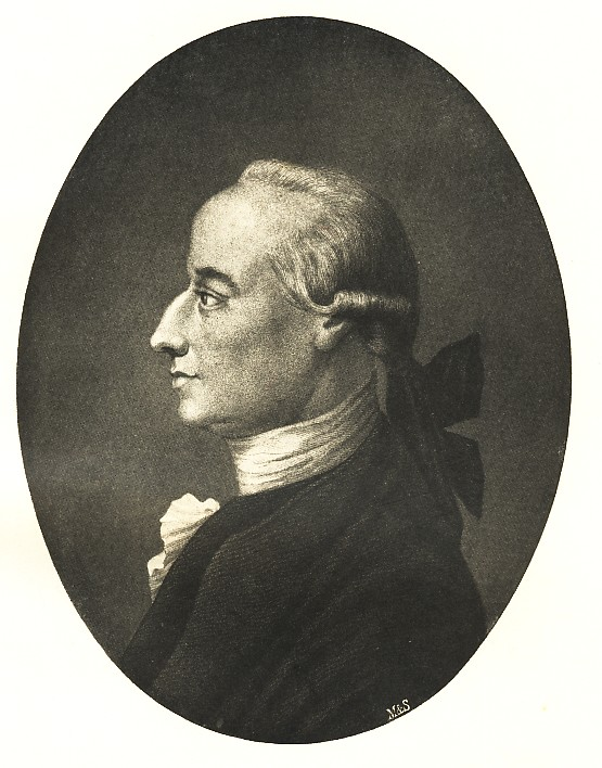 Der deutsche Redakteur Johann Heinrich Merck.